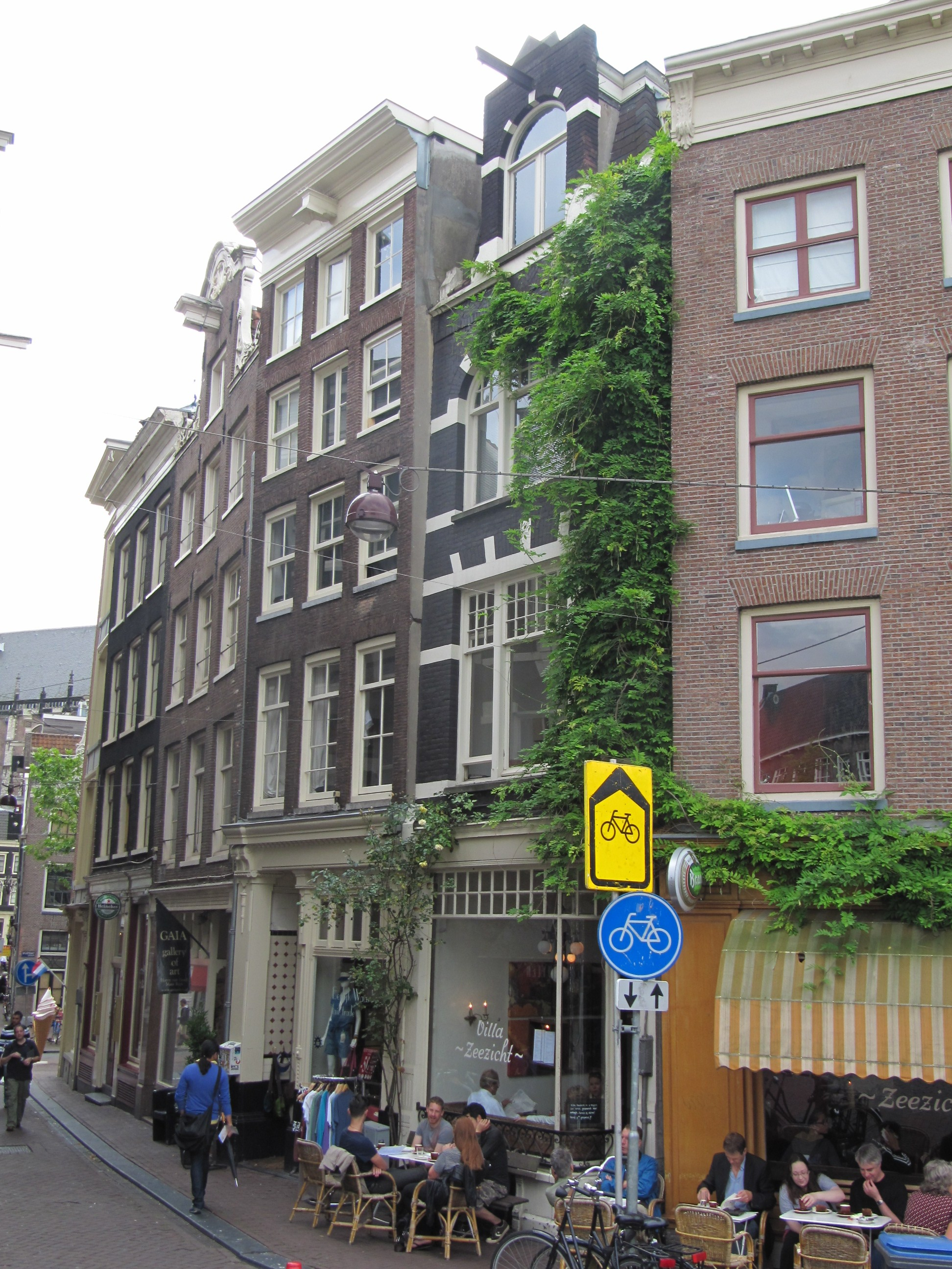 RM5740 Amsterdam - Torensteeg 5.jpg